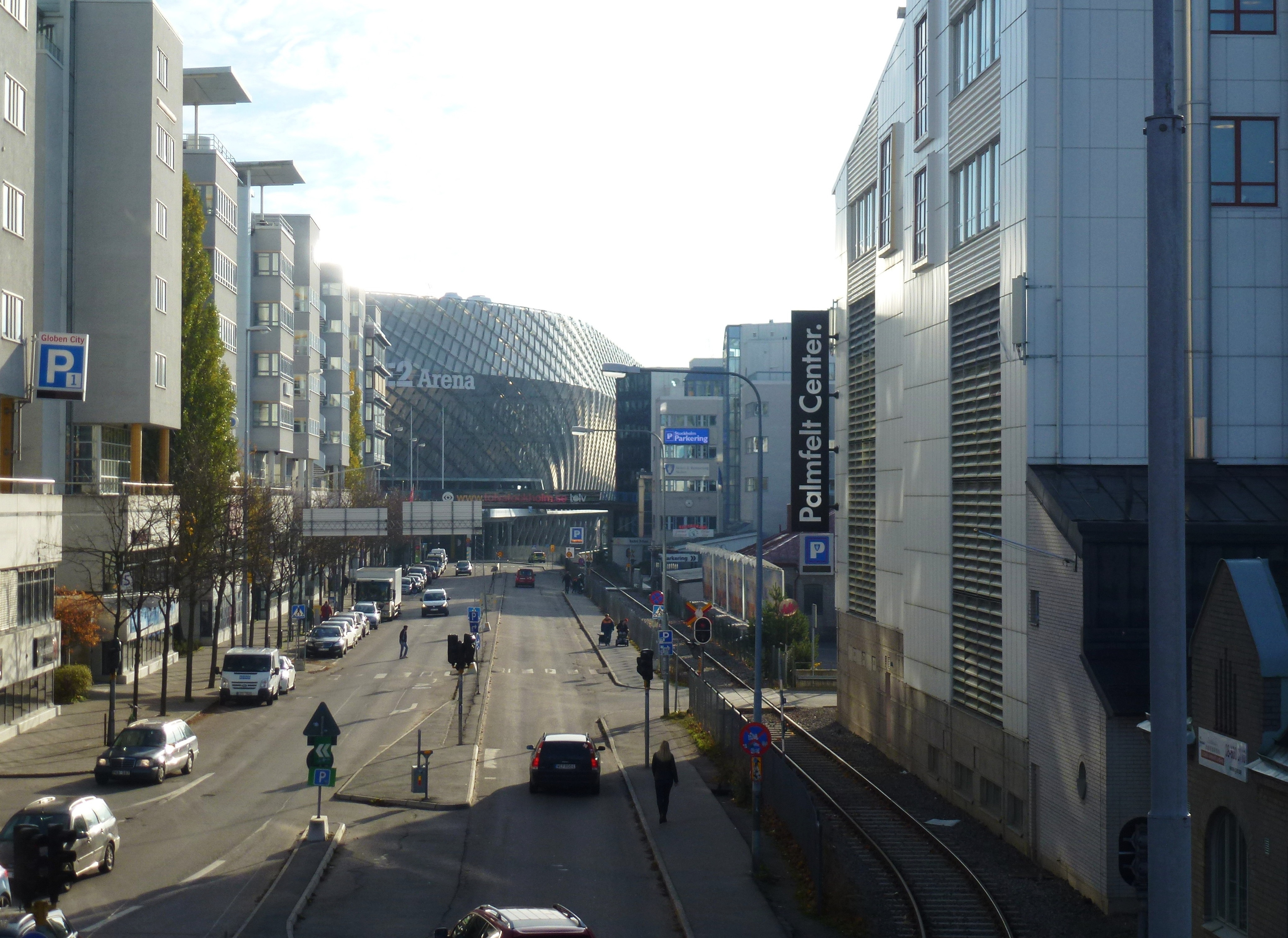 Arenavägen mot syd